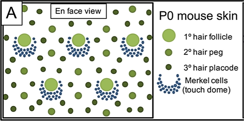 Fig 1. Se requiere β-catenina dérmica para la formación de TD MC. (A) Diagrama esquemático de la piel del ratón P0 que ilustra la relación de las MC en el TD con los folículos pilosos primarios vistos desde arriba.